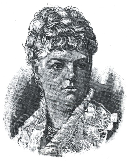 Portrait der deutschen Schriftstellerin Wilhelmine von Hillern.